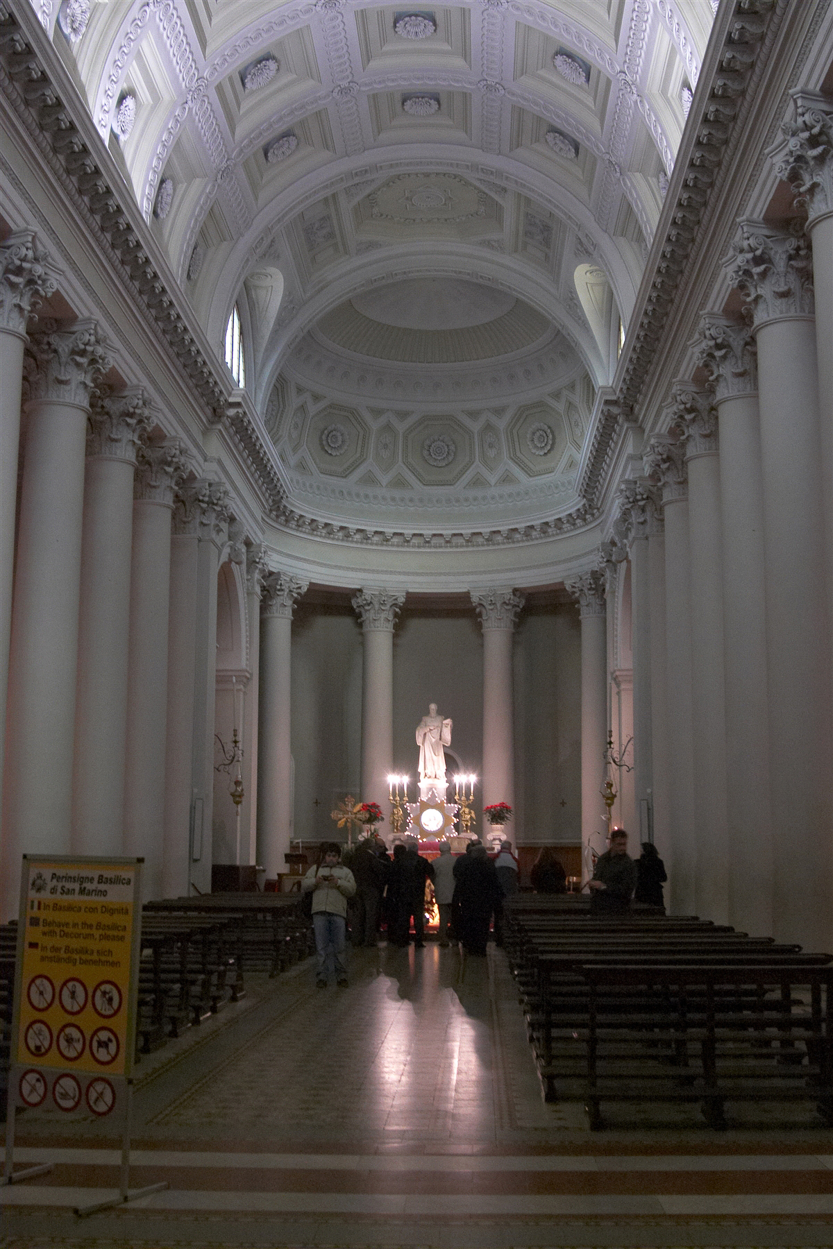 San Marino Basilica di San Marino